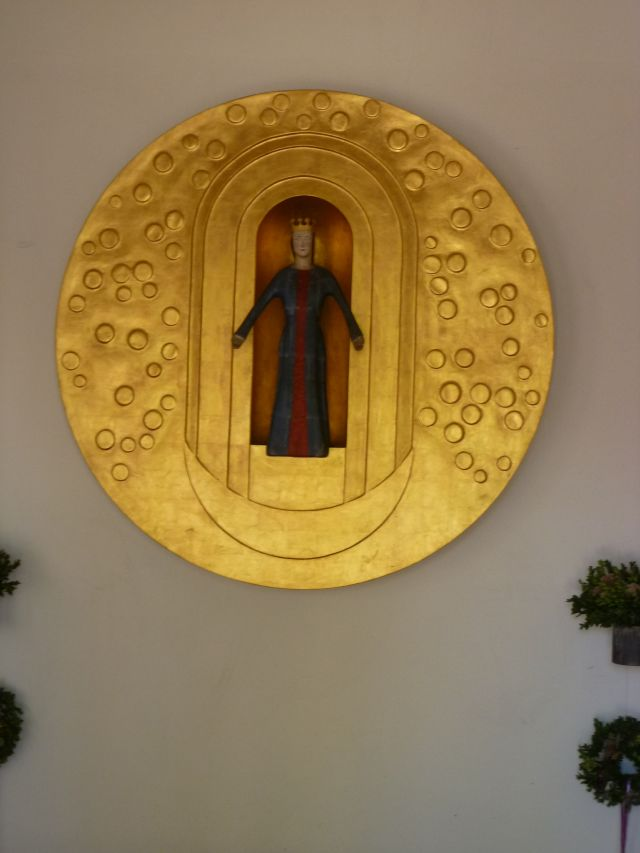 Marienstele in der Mariankapelle in Wals